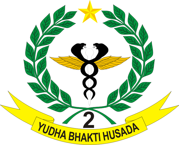 logo yonkes